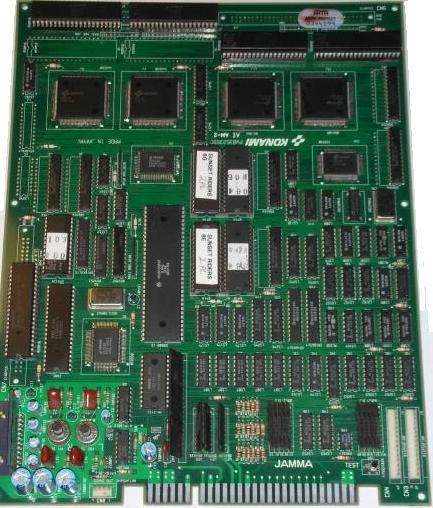 Sunset Riders arcade PCB